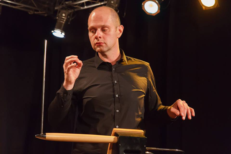 Thorwald Jørgensen bespeelt de theremin